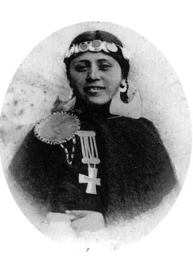 Niña Mapuche de Concepción, Chile. Tarjeta postal de 1902.